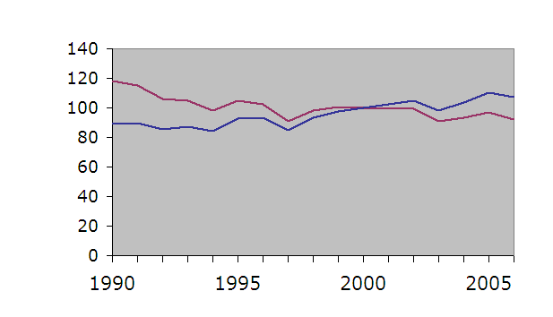 Food production (blue)/per capita (plum) in Tanzania. Year 2000=100. Production agricole (bleu) et par habitant (violet) en Tanzanie. Indice 100=2000.